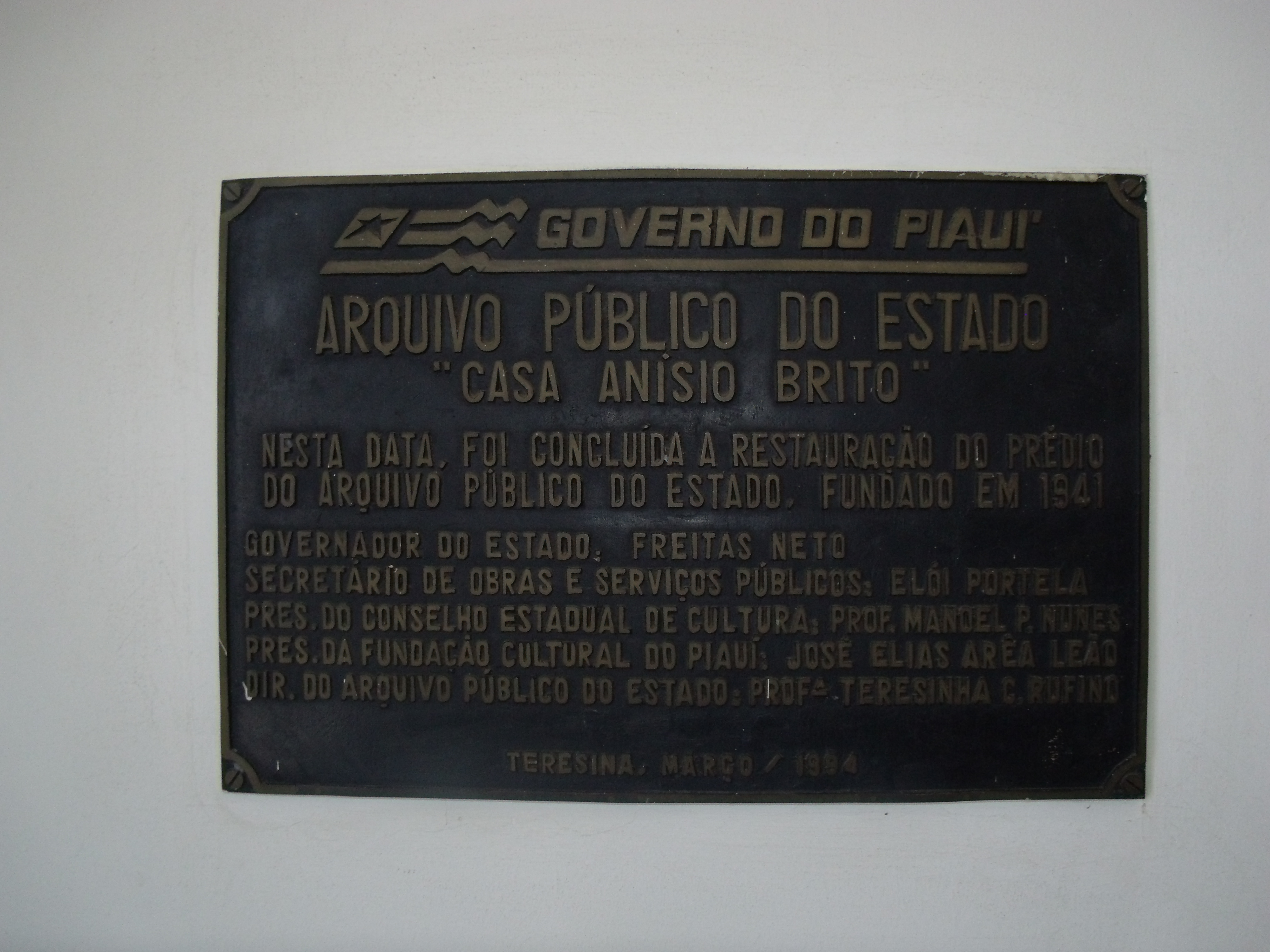 Placa metálica do Arquivo Público do Piauí